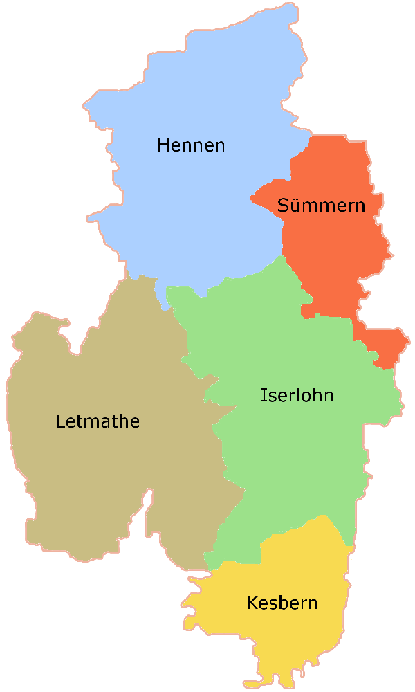 Einteilung des Stadtgebietes von Iserlohn in Stadtbezirke.